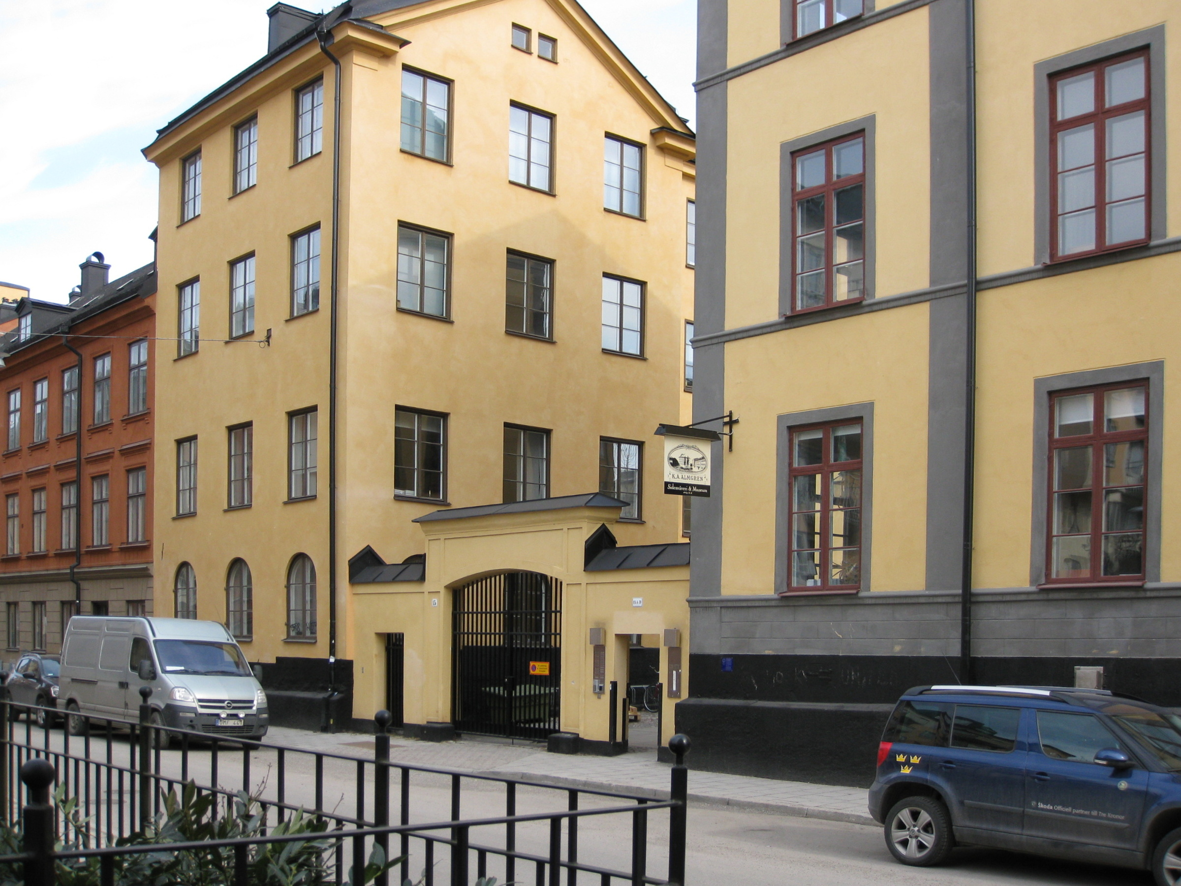 KA Almgrens sidenväveri, Södermalm, Stockholm